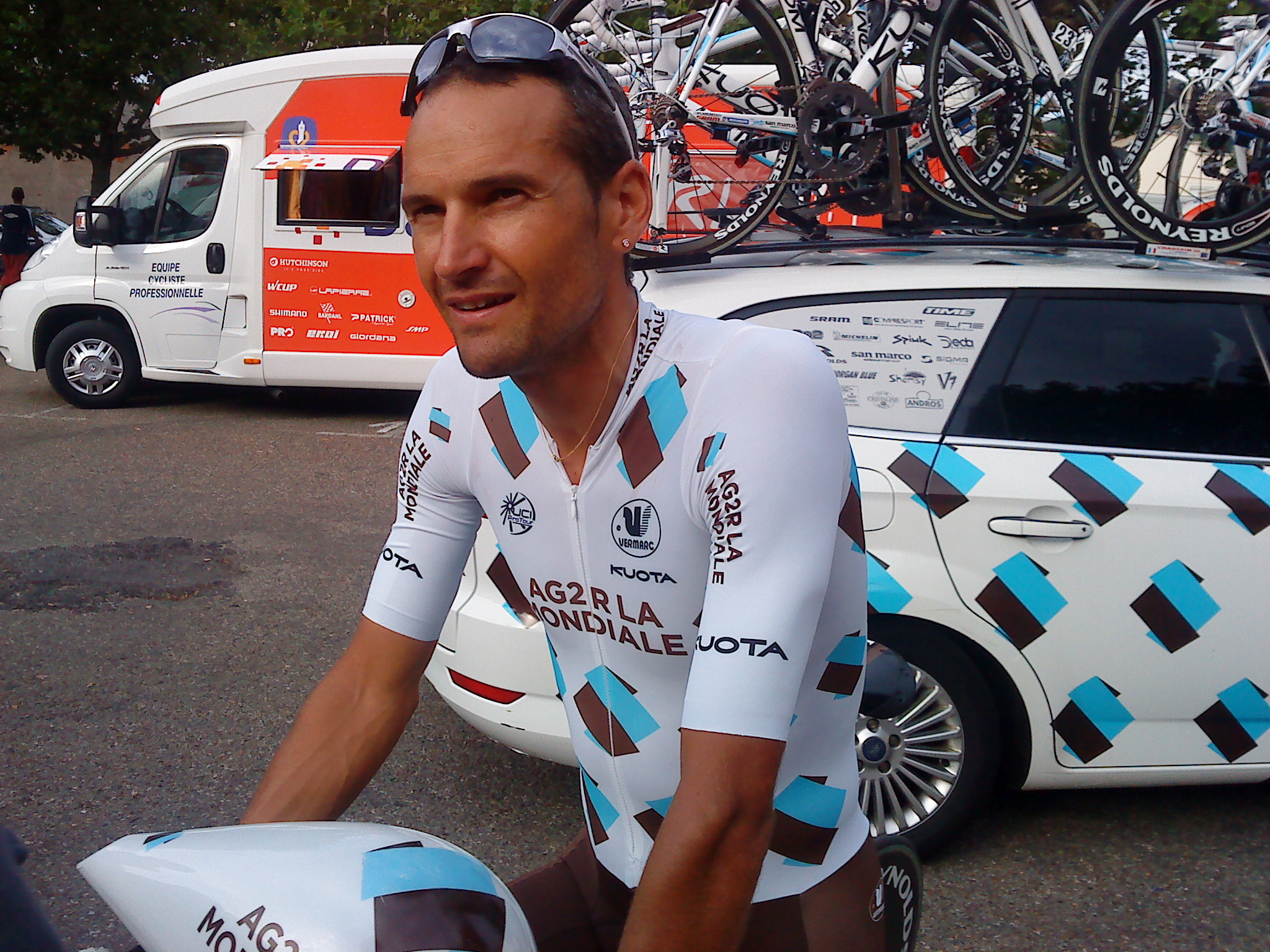 Cyril Dessel après l'arrivée du prologue du Tour de l'Ain 2010